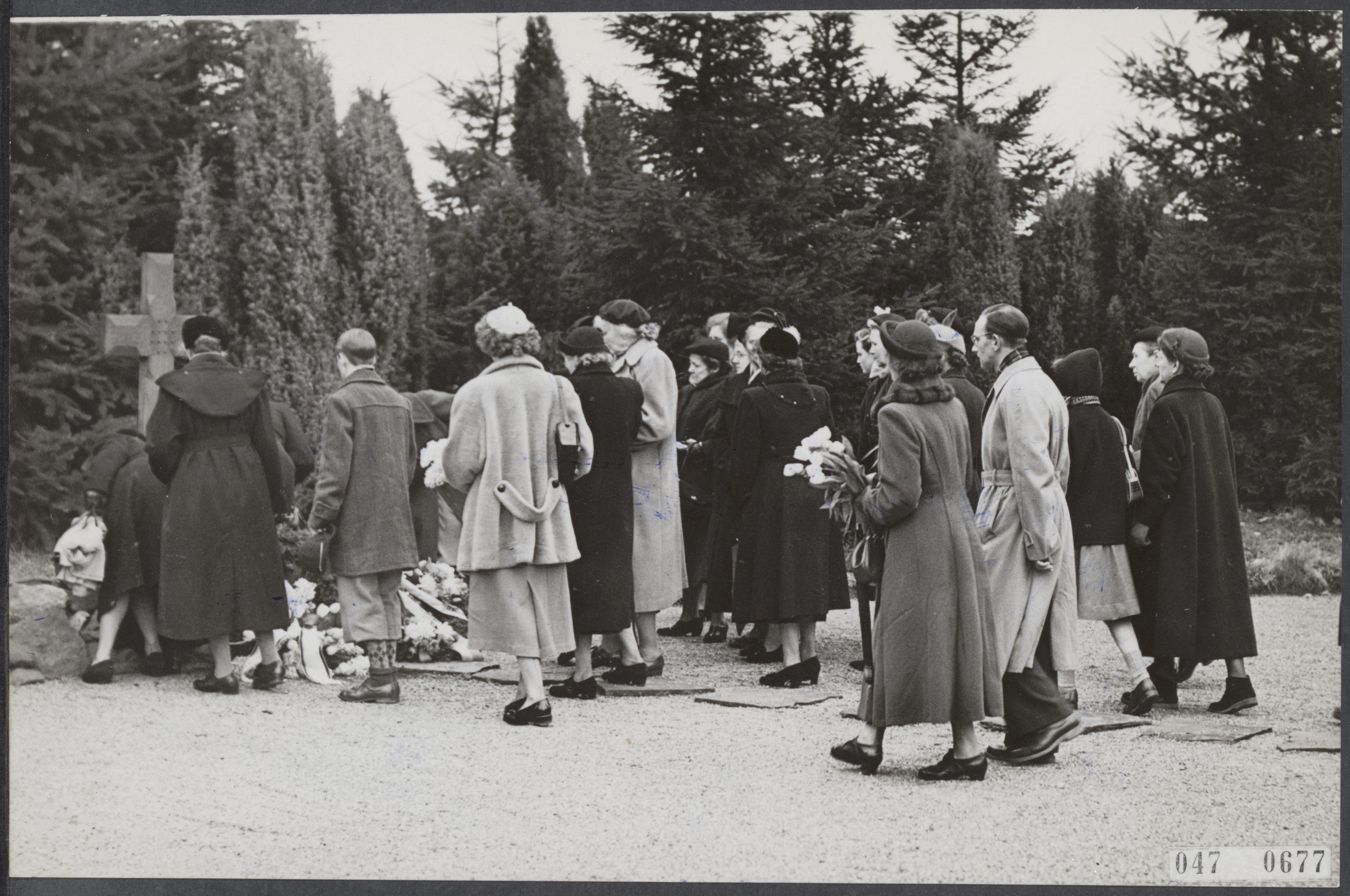 Collectie / Archief : Fotocollectie Elsevier Reportage / Serie : [ onbekend ] Beschrijving : Herdenking bij de "Woeste Hoeve"op de Veluwe van de 117 slachtoffers die op 8 maart 1945 na de aanslag op Rauter aldaar door de bezetter werden gefusilleerd. Na de toespraak van de burgemeester van Apeldoorn legden nabestaanden bloemen bij het eenvoudige monument Datum : 8 maart 1954 Locatie : Apeldoorn, Gelderland, Veluwe Trefwoorden : dodenherdenkingen, oorlogsmonumenten, oorlogsslachtoffers, tweede wereldoorlog Fotograaf : Bilsen, Joop van / Anefo Auteursrechthebbende : Nationaal Archief Materiaalsoort : Foto (zwart/wit) Nummer archiefinventaris : bekijk toegang 2.24.05.02 Bestanddeelnummer : 047-0677